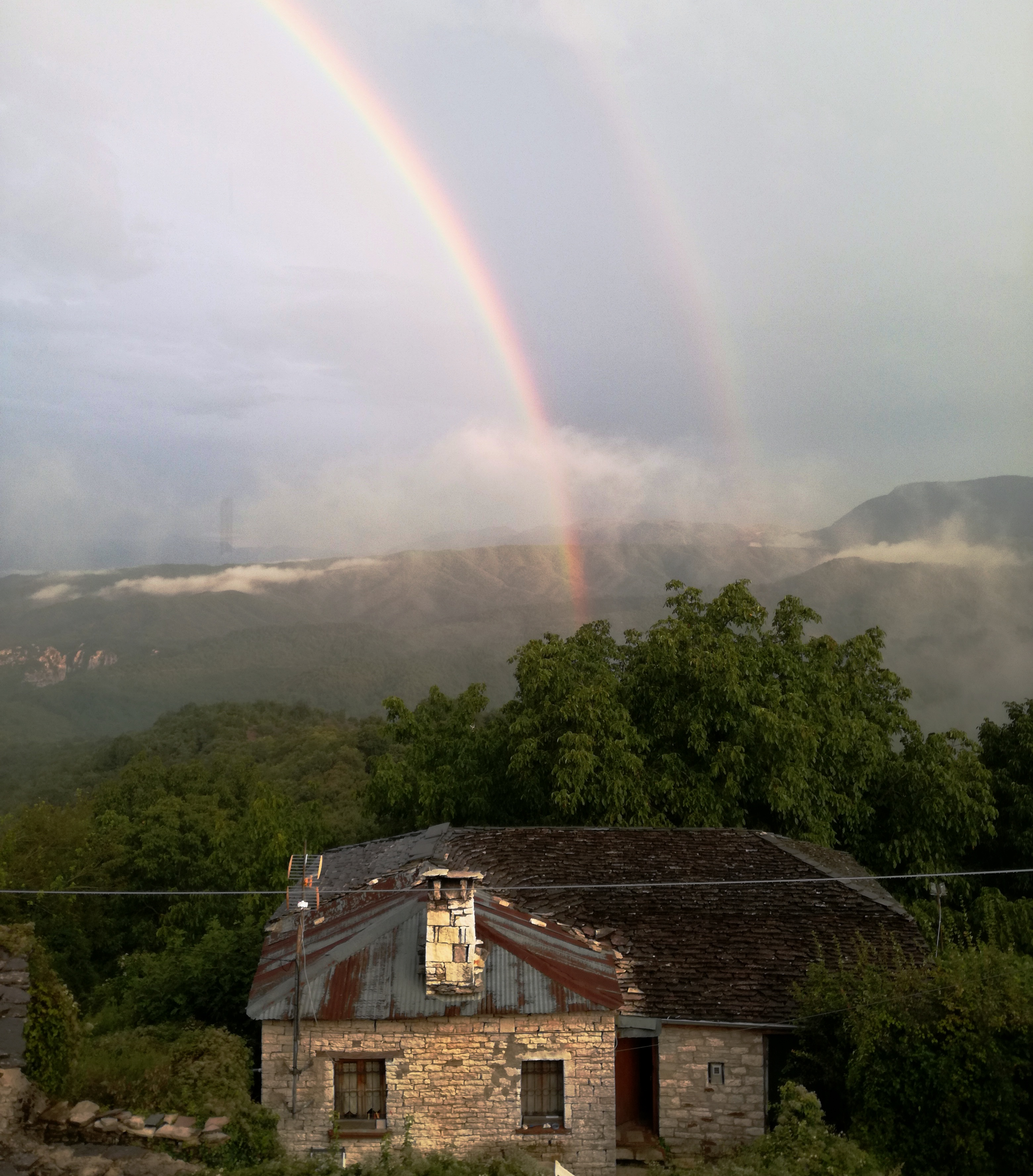 Διπλό ουράνιο τόξο στη Βίτσα